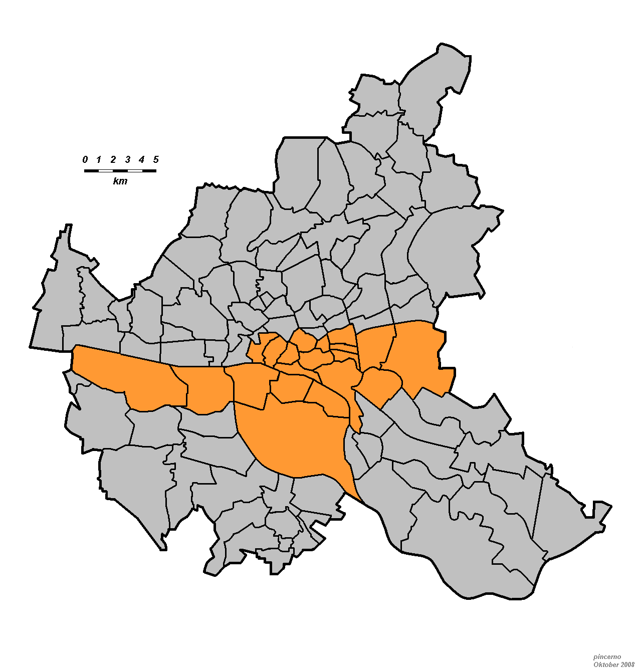 Der Bezirk Hamburg-Mitte in Hamburg.